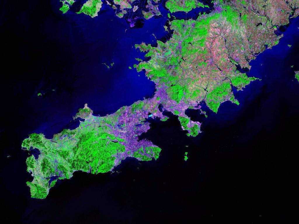 Dalian - Landsat satellite photo (circa 2000)